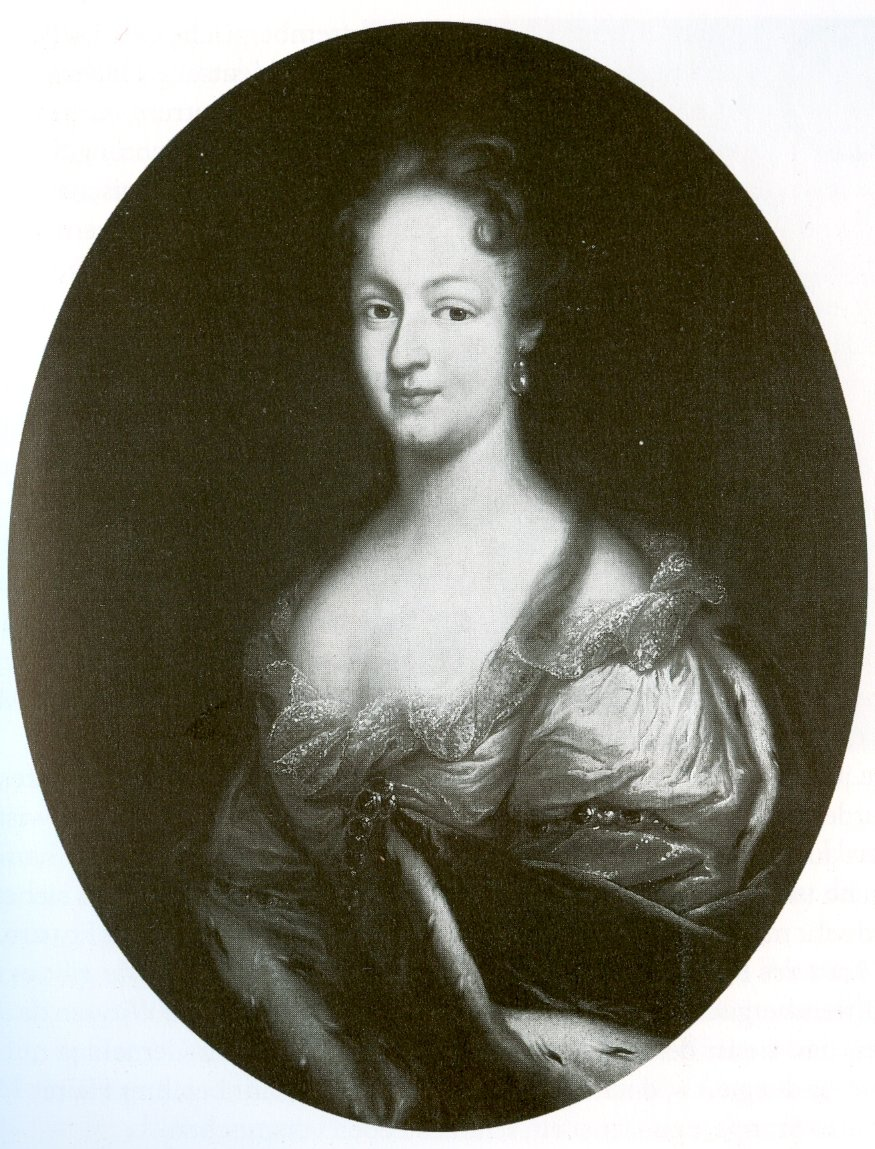 Eleonore Juliane von Brandenburg-Ansbach (1663-1724), Gattin von Friedrich Karl von Württenberg (Linie Winnental)